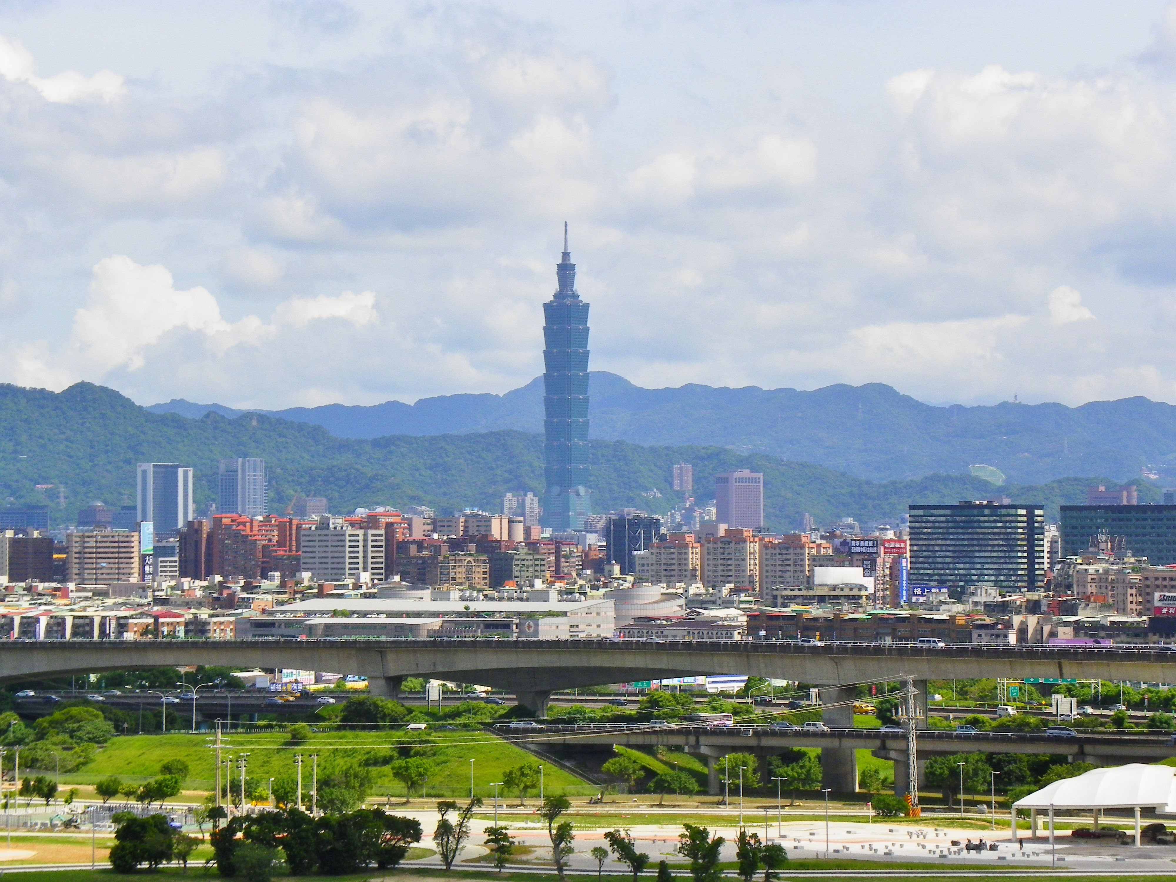 中文（台灣）: 從臺北圓山大飯店麒麟樓二樓陽台東南遠望中山高速公路汐五高架橋與臺北市中山區。